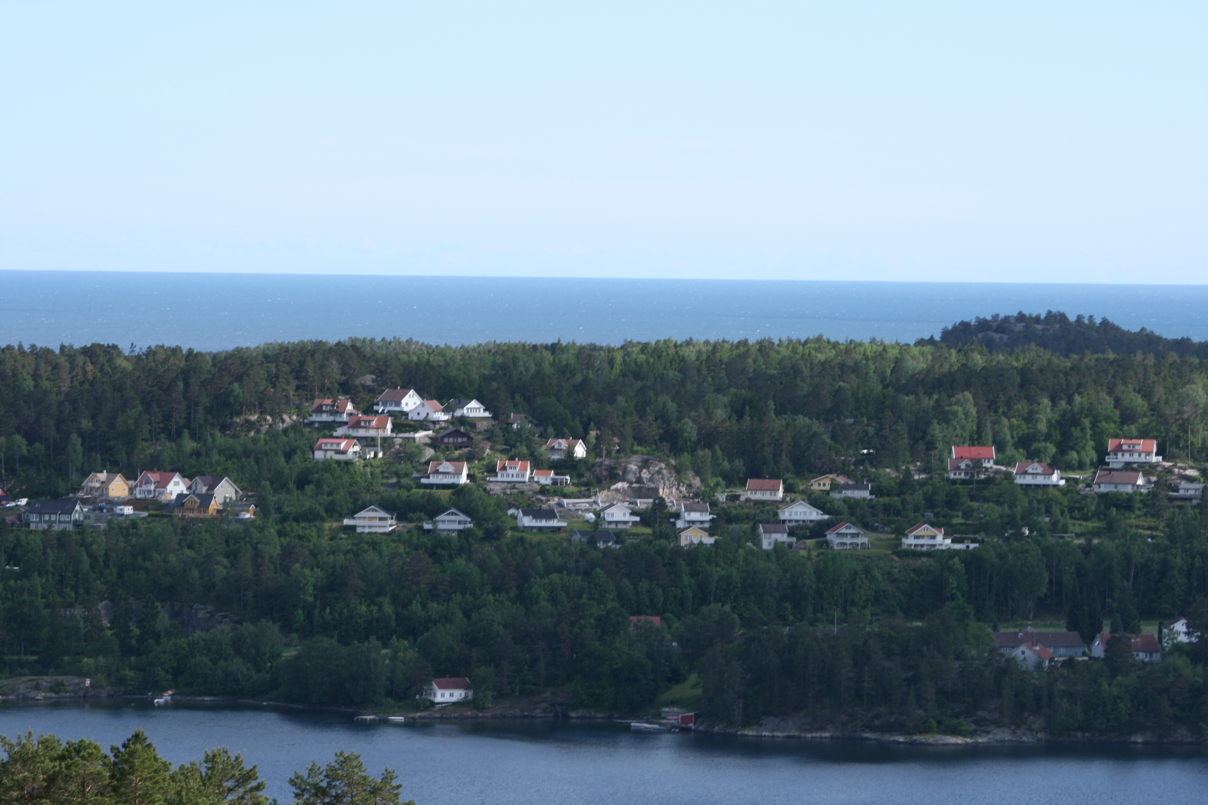 Sandnes/Hope